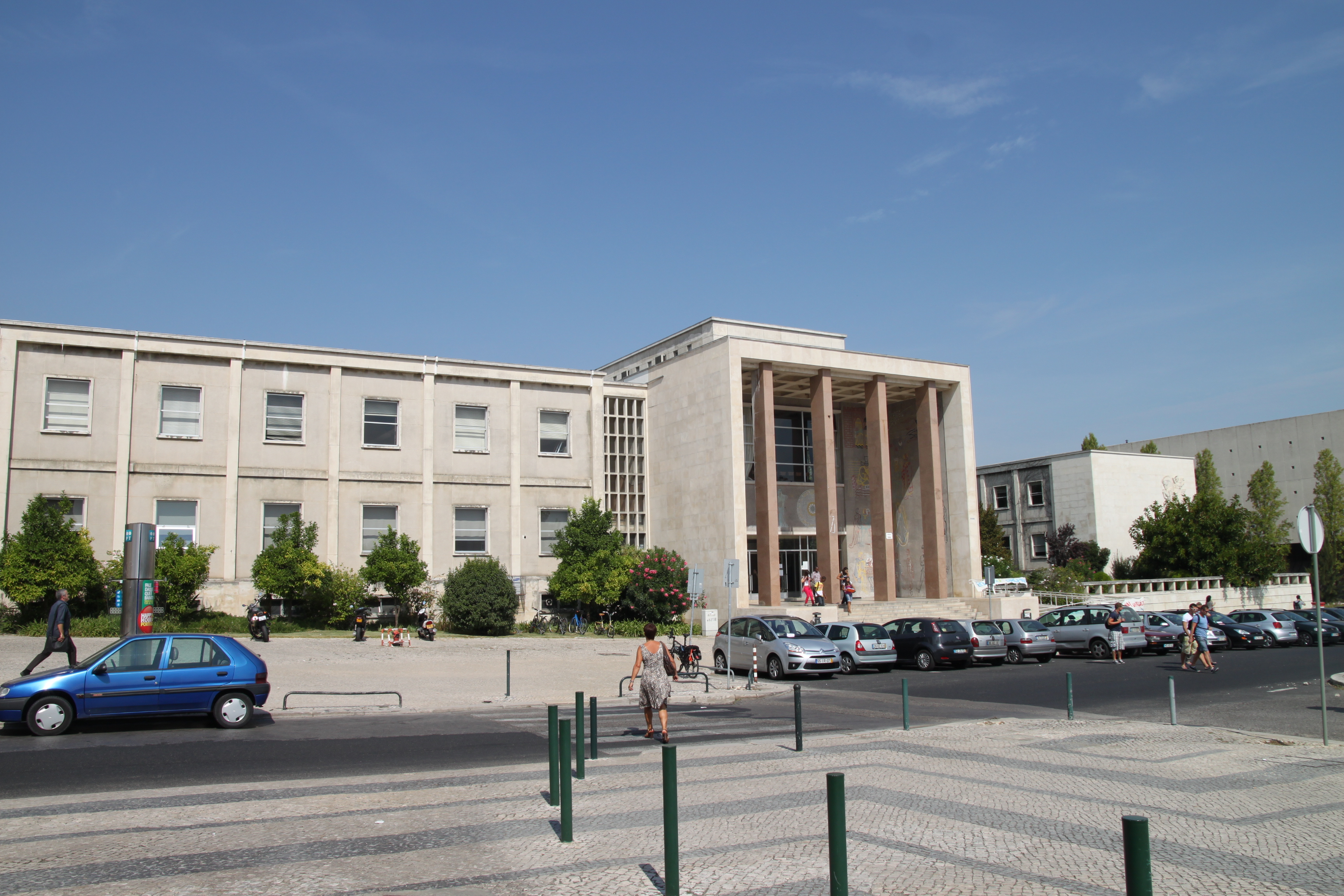 Faculdade de Letras da Universidade de Lisboa This file was uploaded for Wiki Loves Monuments in Portugal with the unique identifier 97014259.